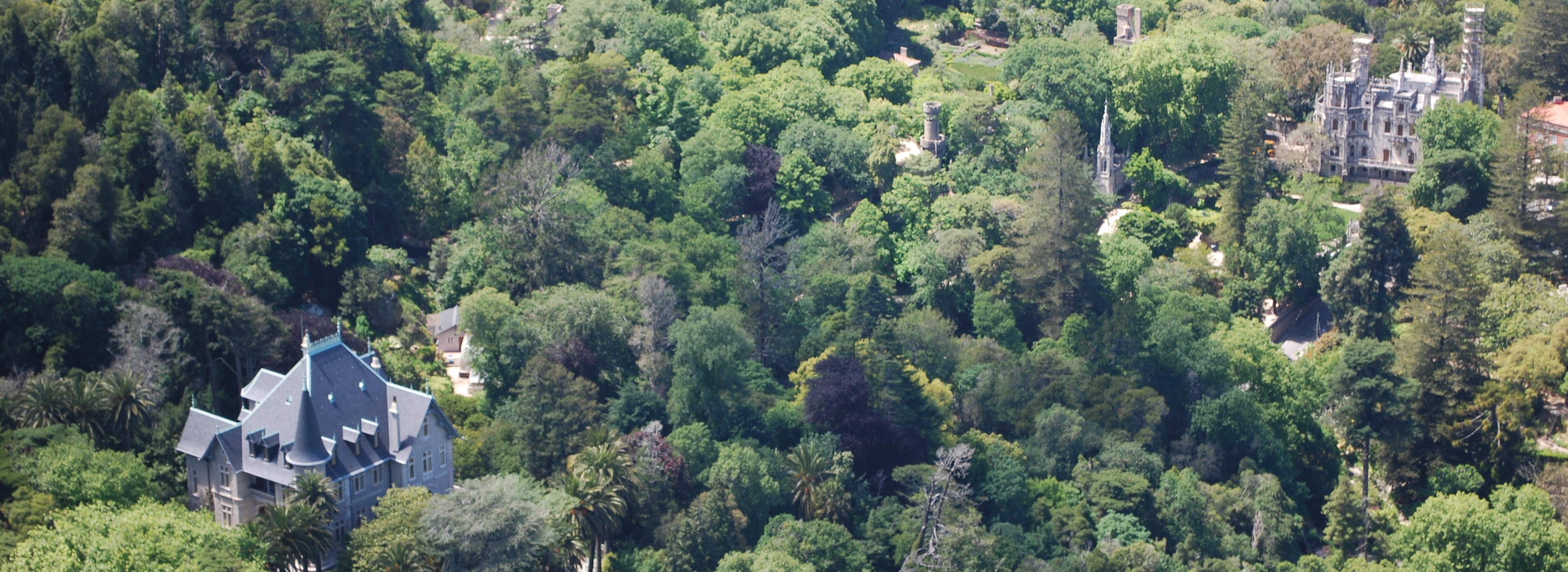 A Casa Biester está na esquerda, na direita é a Quinta da Regaleira This file was uploaded for Wiki Loves Monuments in Portugal with the unique identifier 97007737.